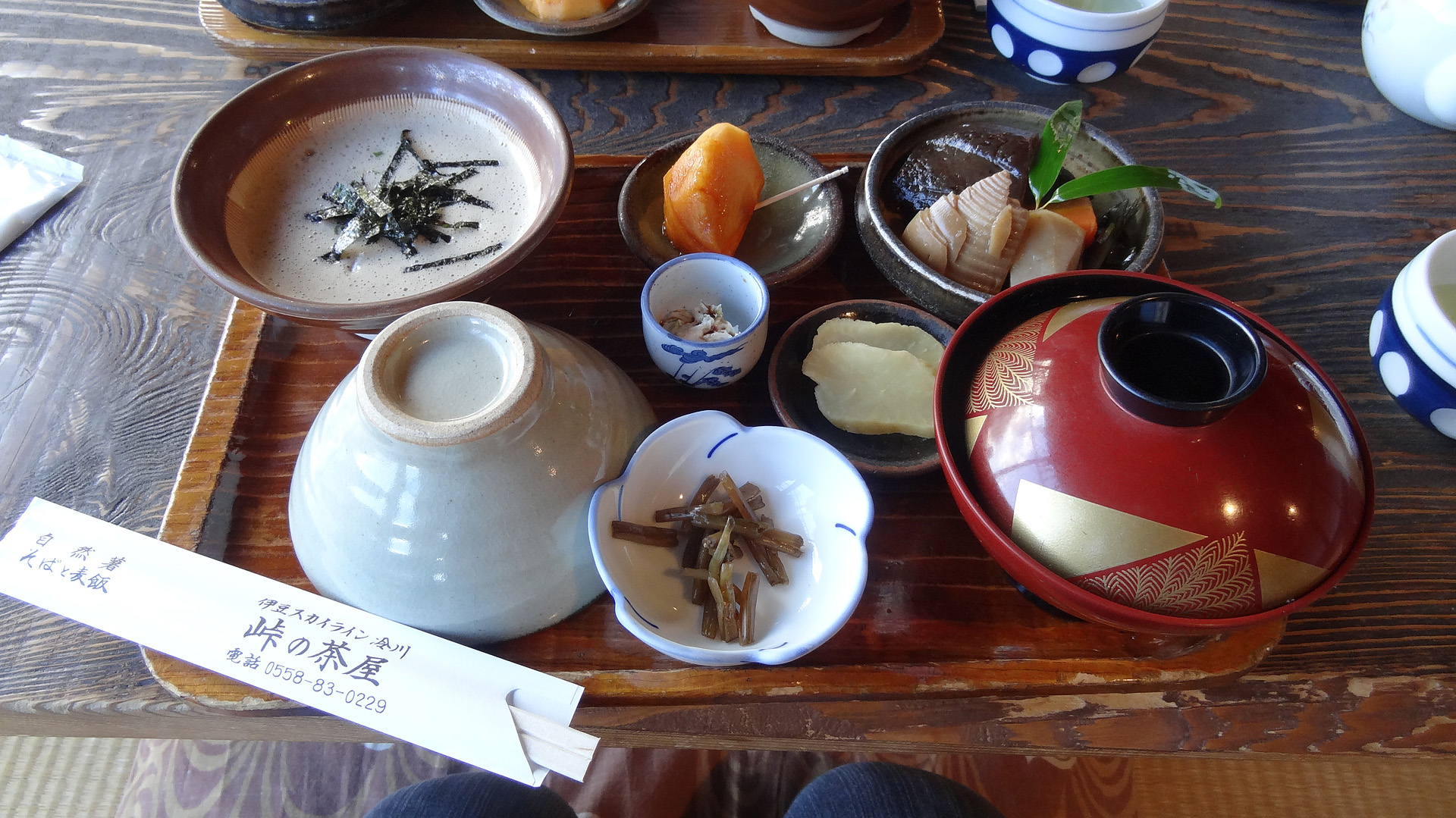 峠の茶屋 自然薯のとろろ定食が特徴 静岡県伊豆市冷川1800